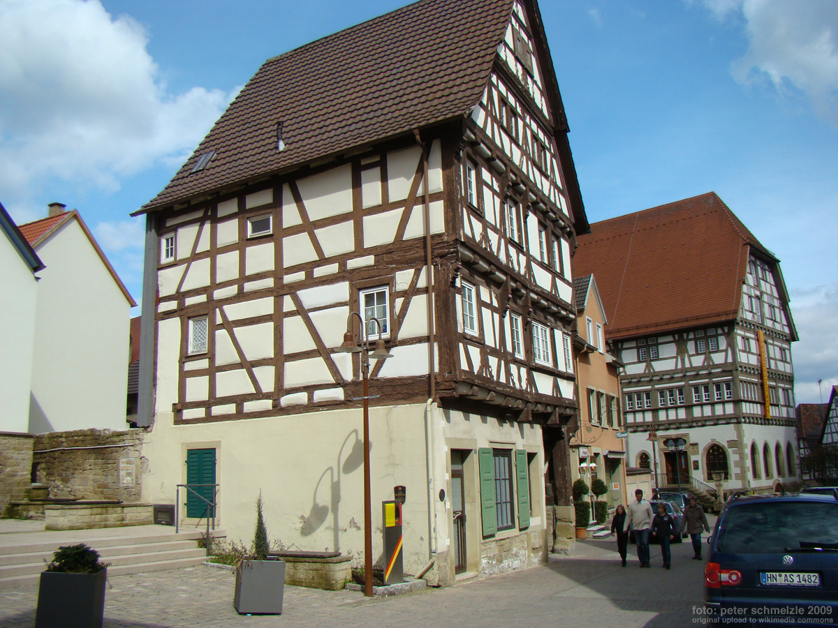 Historisches Gebäude Altstadtstraße 11 in Eppingen